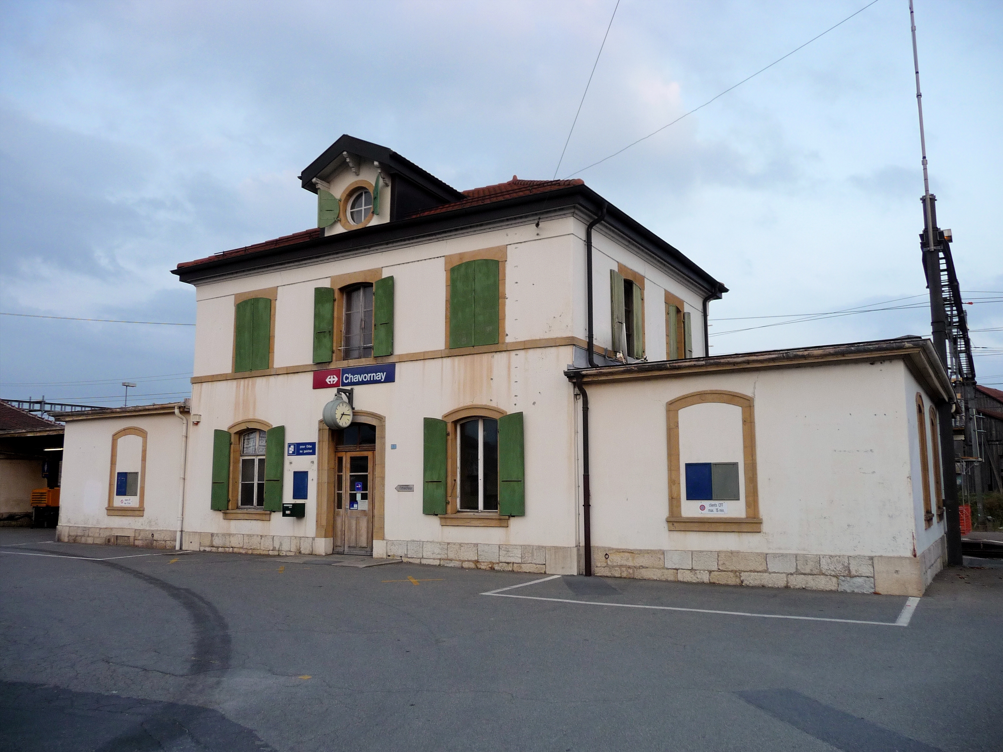 Gare de Chavornay.